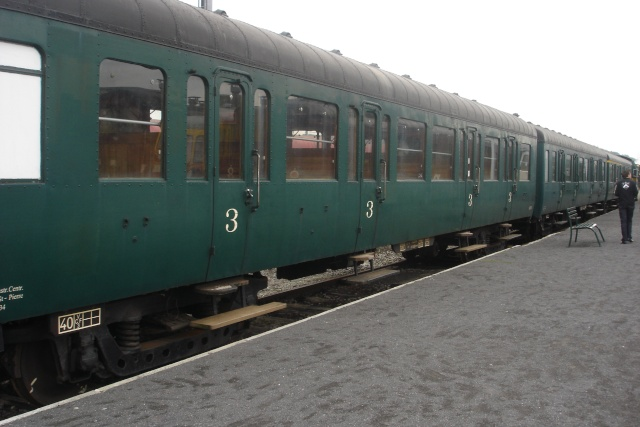 Musée de Treignes - Chemin de Fer à Vapeur des Trois Vallées